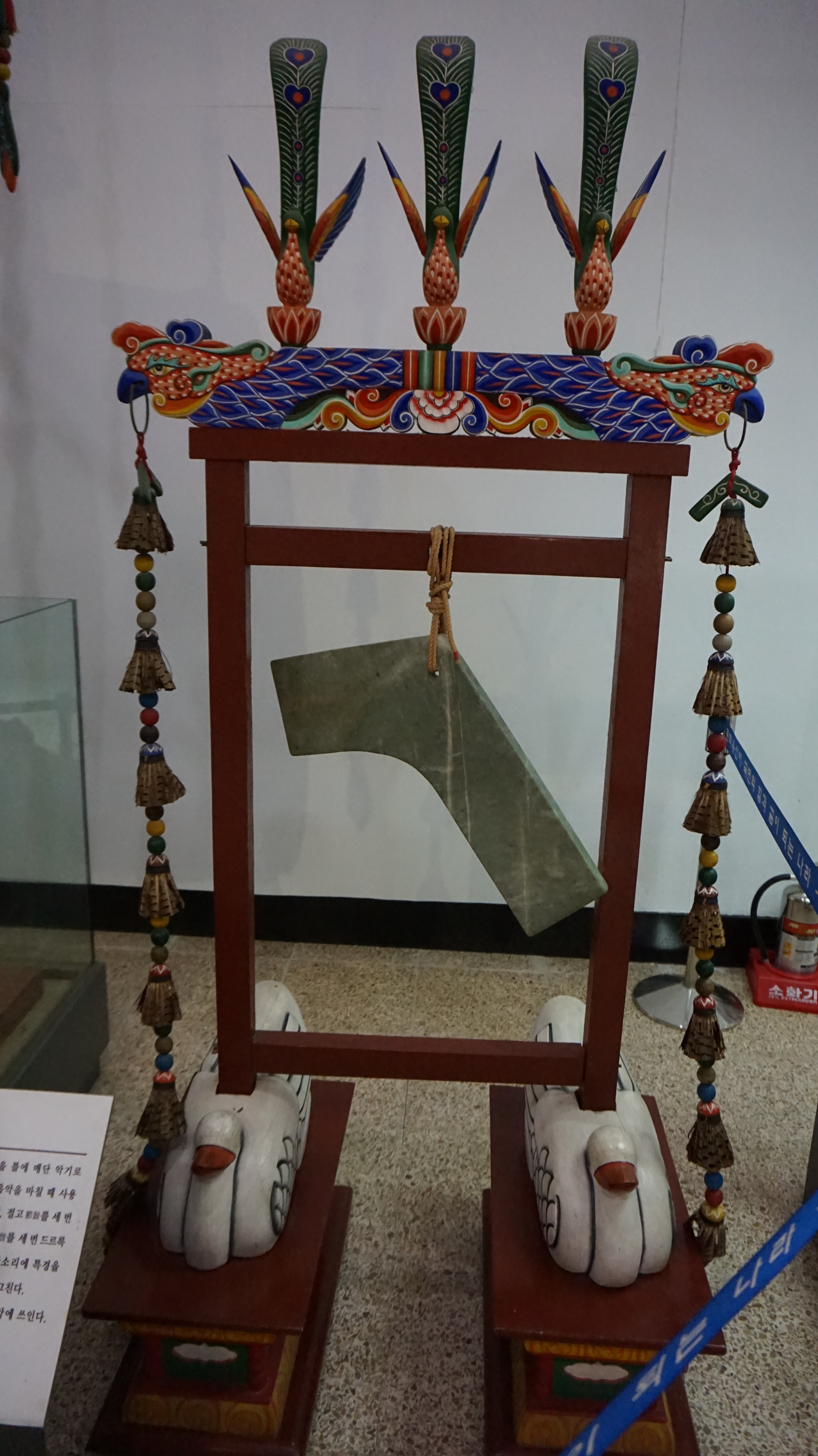 특경 (1)